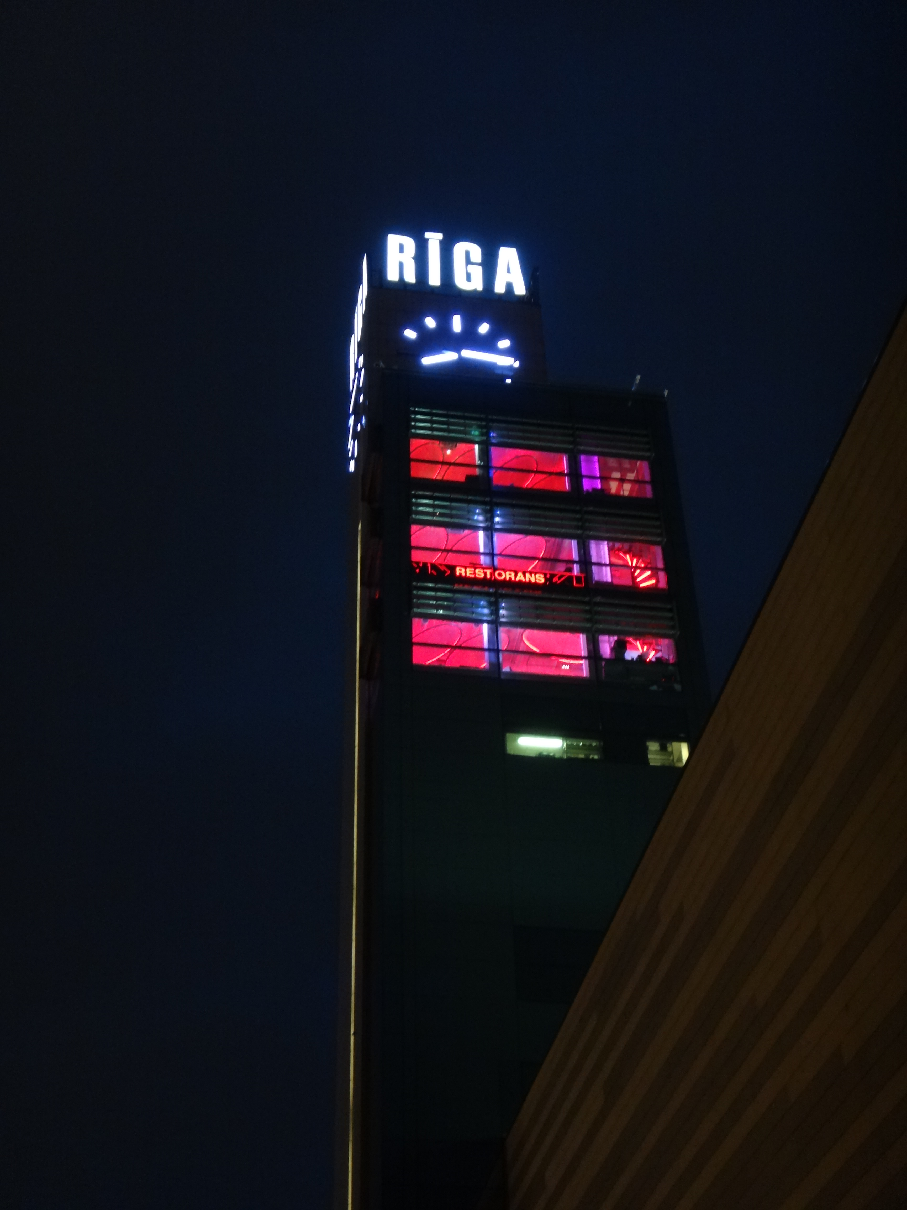 Centrs, Centra rajons, Rīga, Latvia